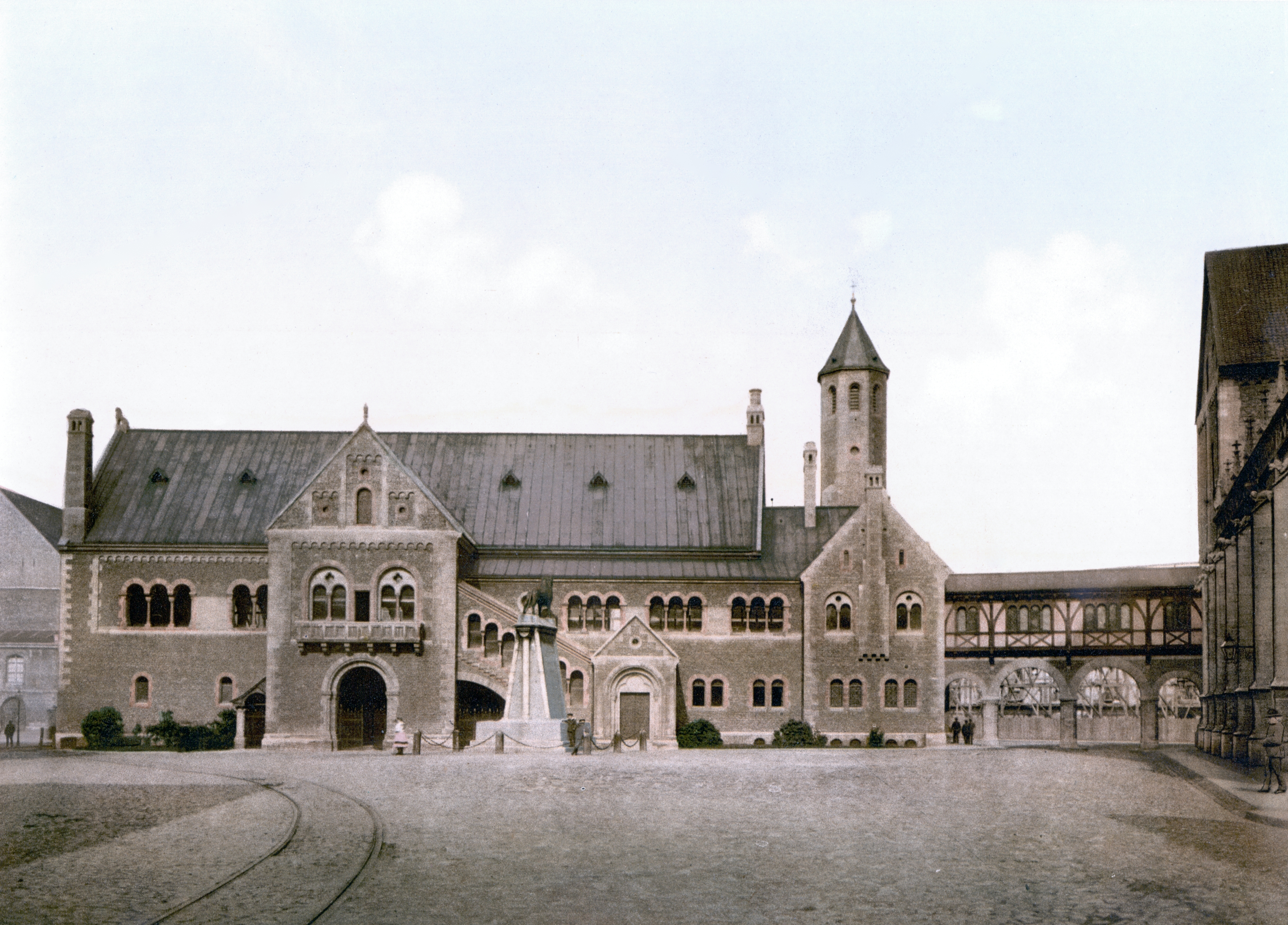 Burg Dankwarderode